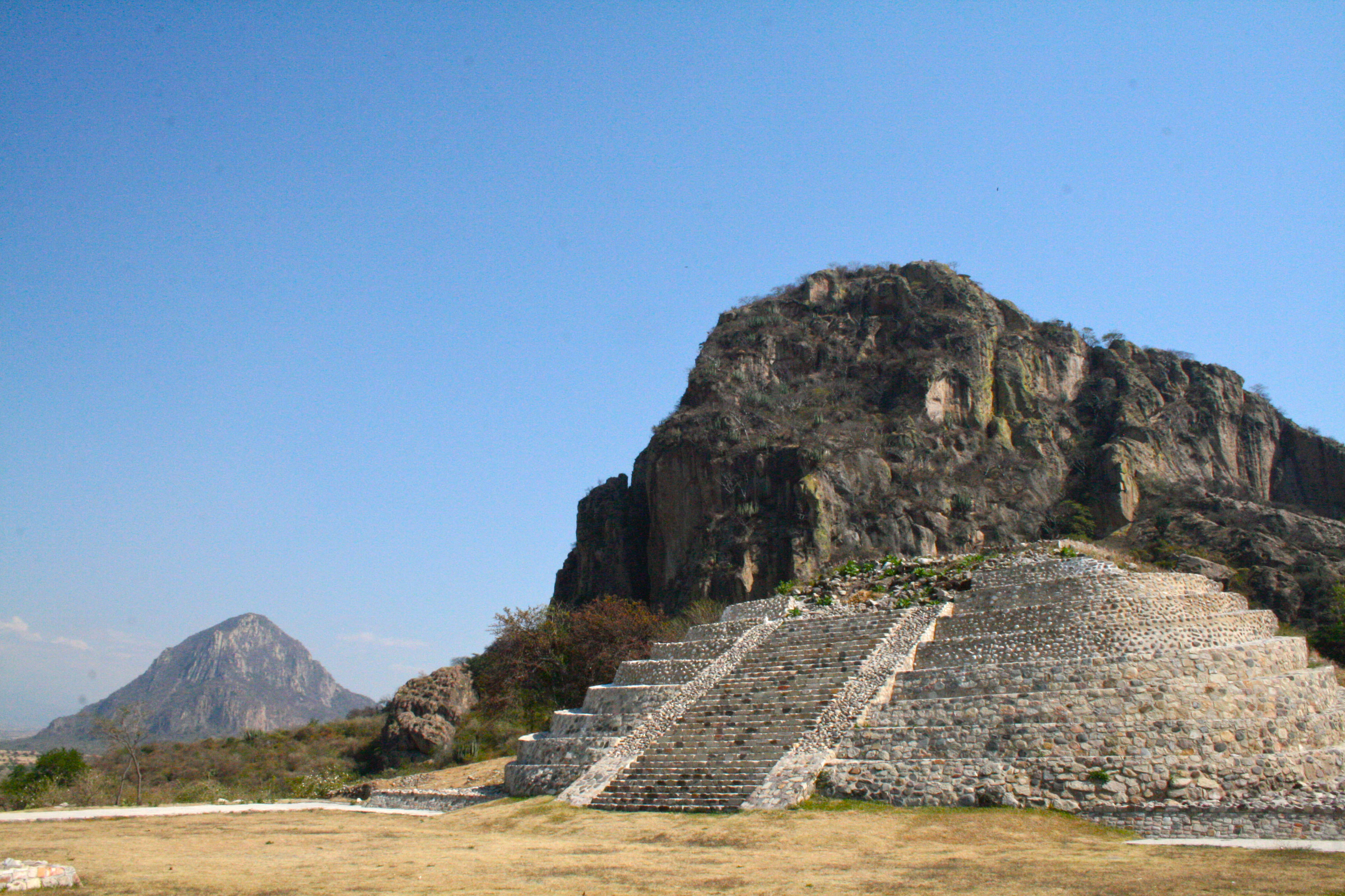 Piramide del sitio arqueológico de Chalcatzingo, al oriente del estado mexicano de Morelos.